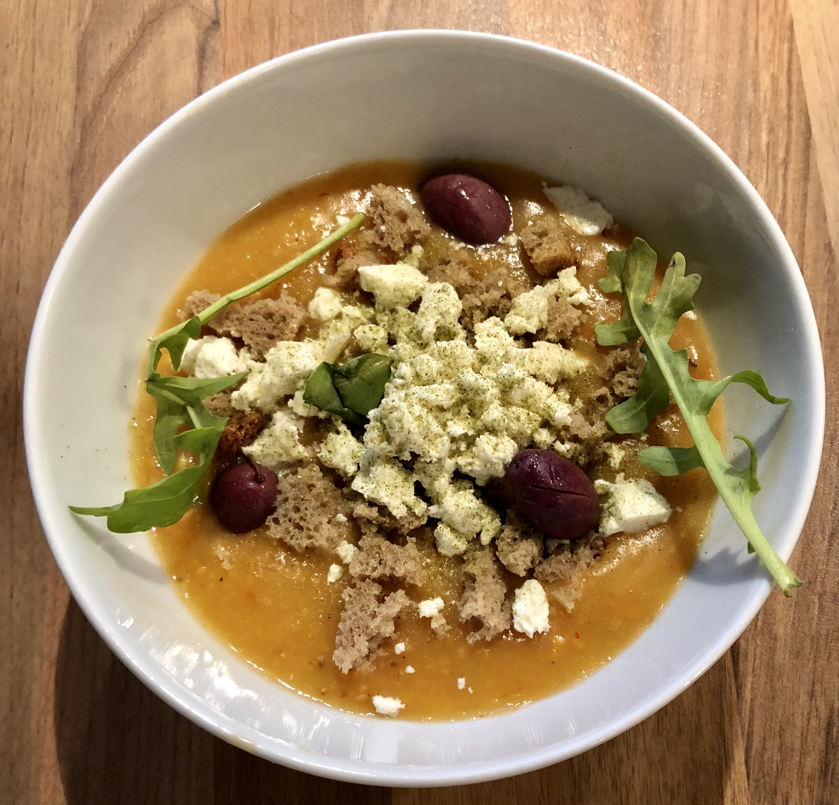 Übliche Variation des Trachana